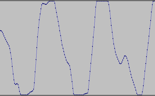 Screenshot van een fragment van :Media:Nl-Fuck-article.ogg in Audacity (open source).